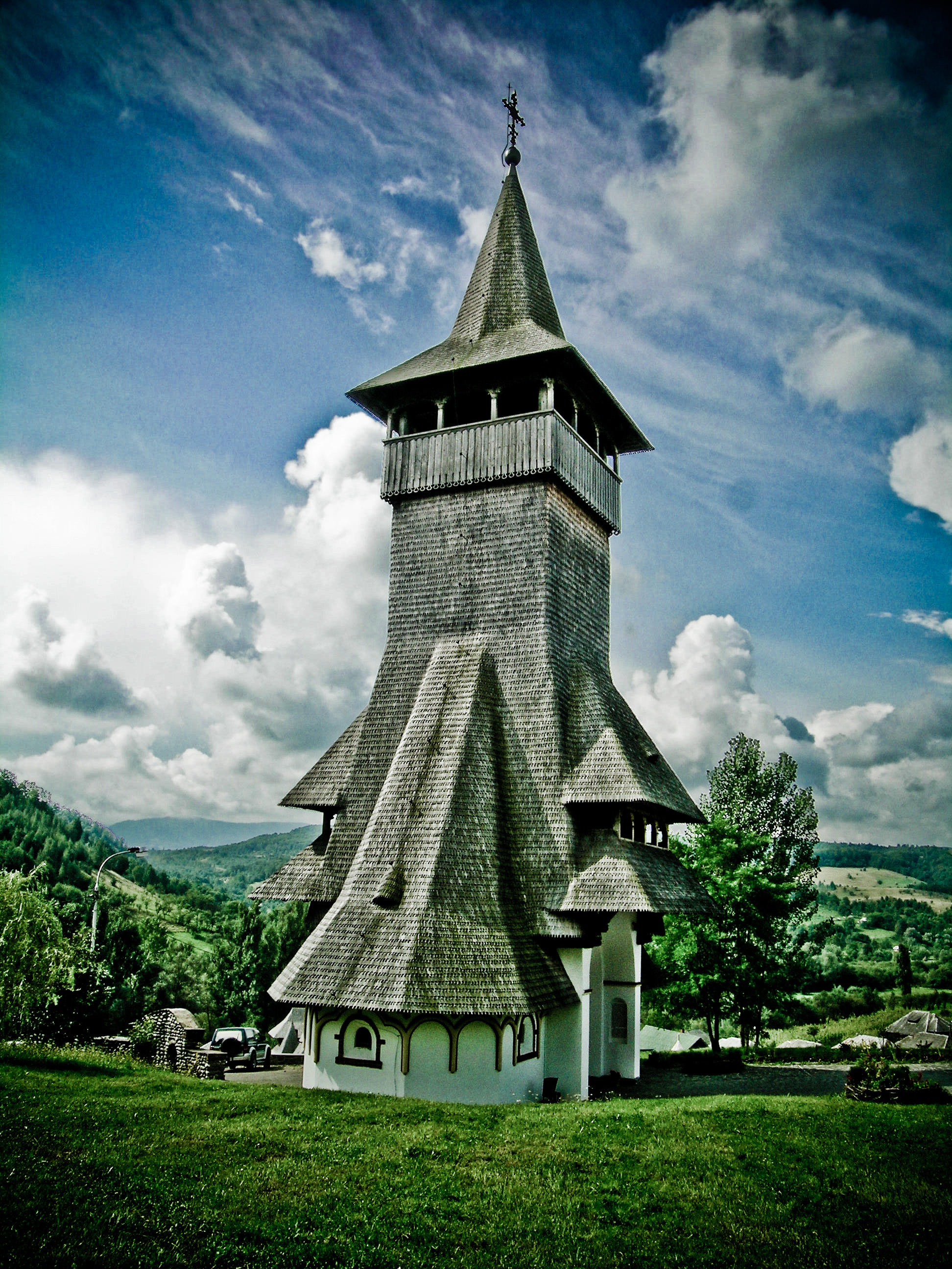 Bârsana church, Maramureş, RomaniaBarsana